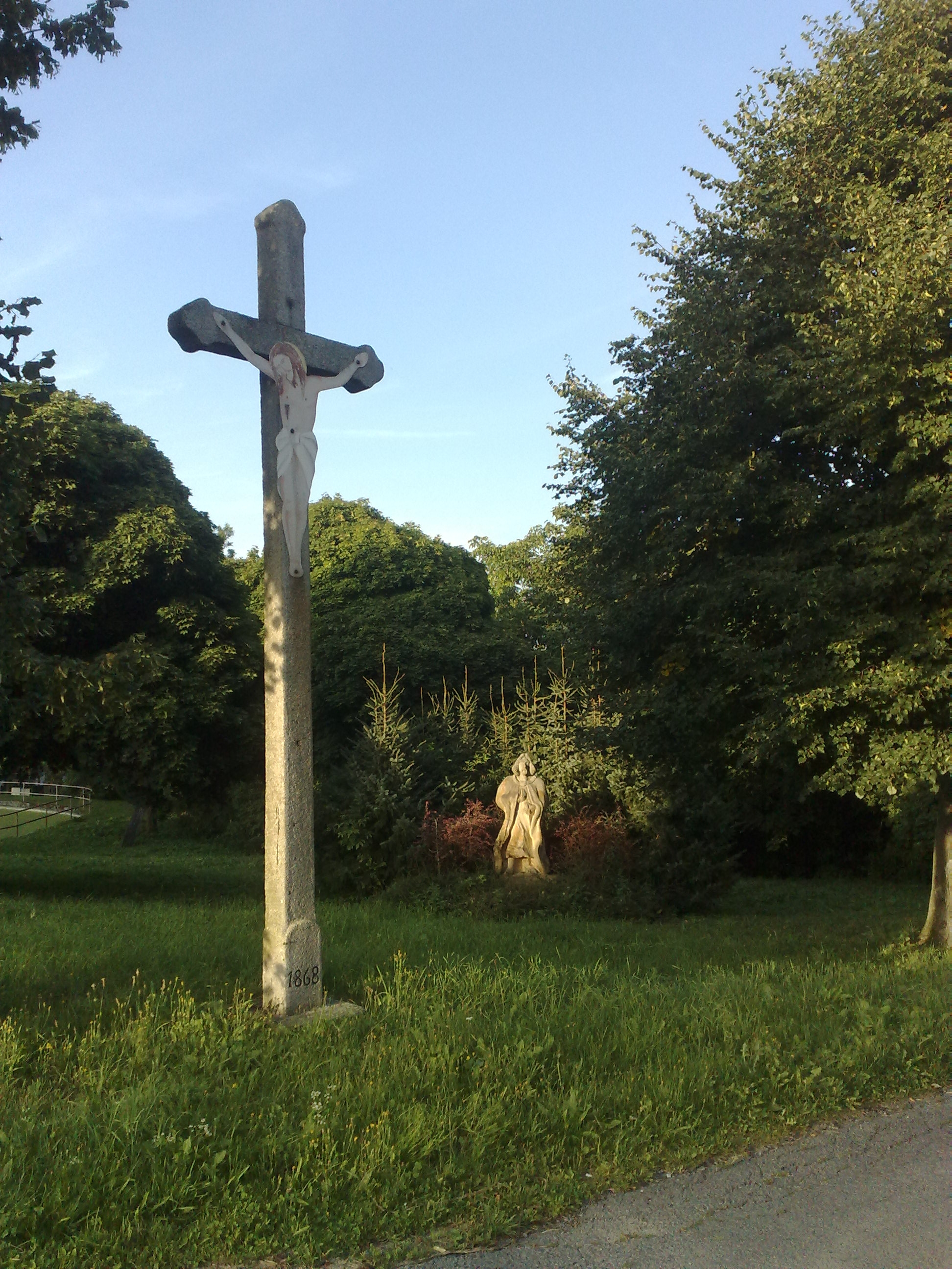 Fotografie pořízena v Nové Vsi u Oselců.